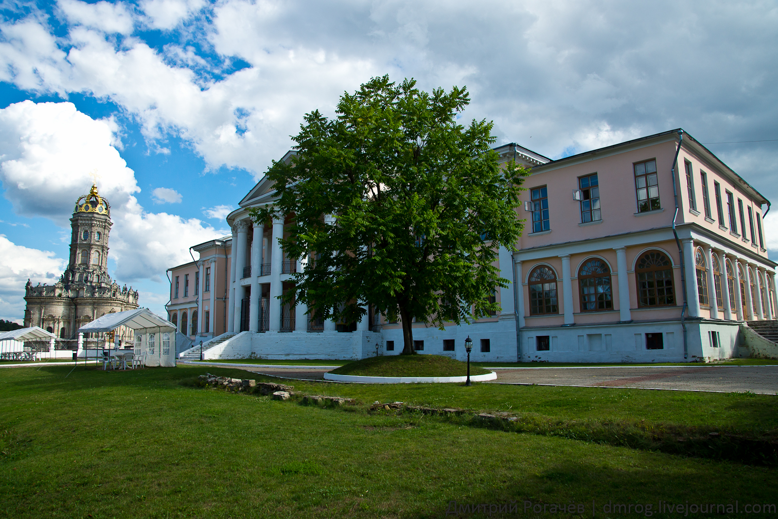 Вид усадьбы сзади